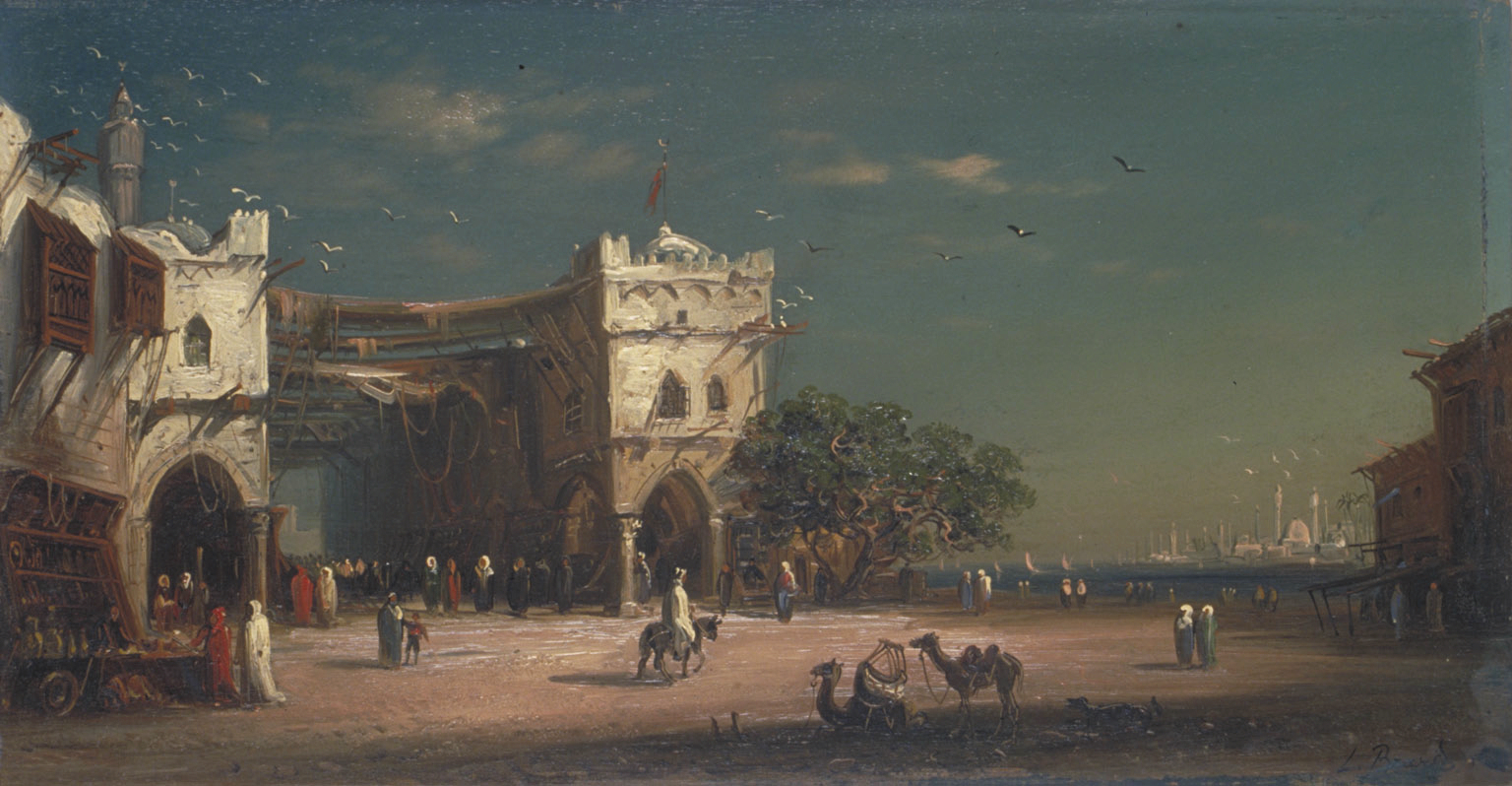 Paysage orientaliste : vue sur le Bosphore (Ancien titre : Paysage marocain avec maisons), Léon Brard (1830-1902). Huile sur bois. Hauteur sans cadre en cm 22 ; Largeur sans cadre en cm 42,3 ; Hauteur avec cadre en cm 30,3 ; Largeur avec cadre en cm 49,7. Numéro d'inventaire : Bx M 1435. Mode d'acquisition Legs Bonie, 1895.